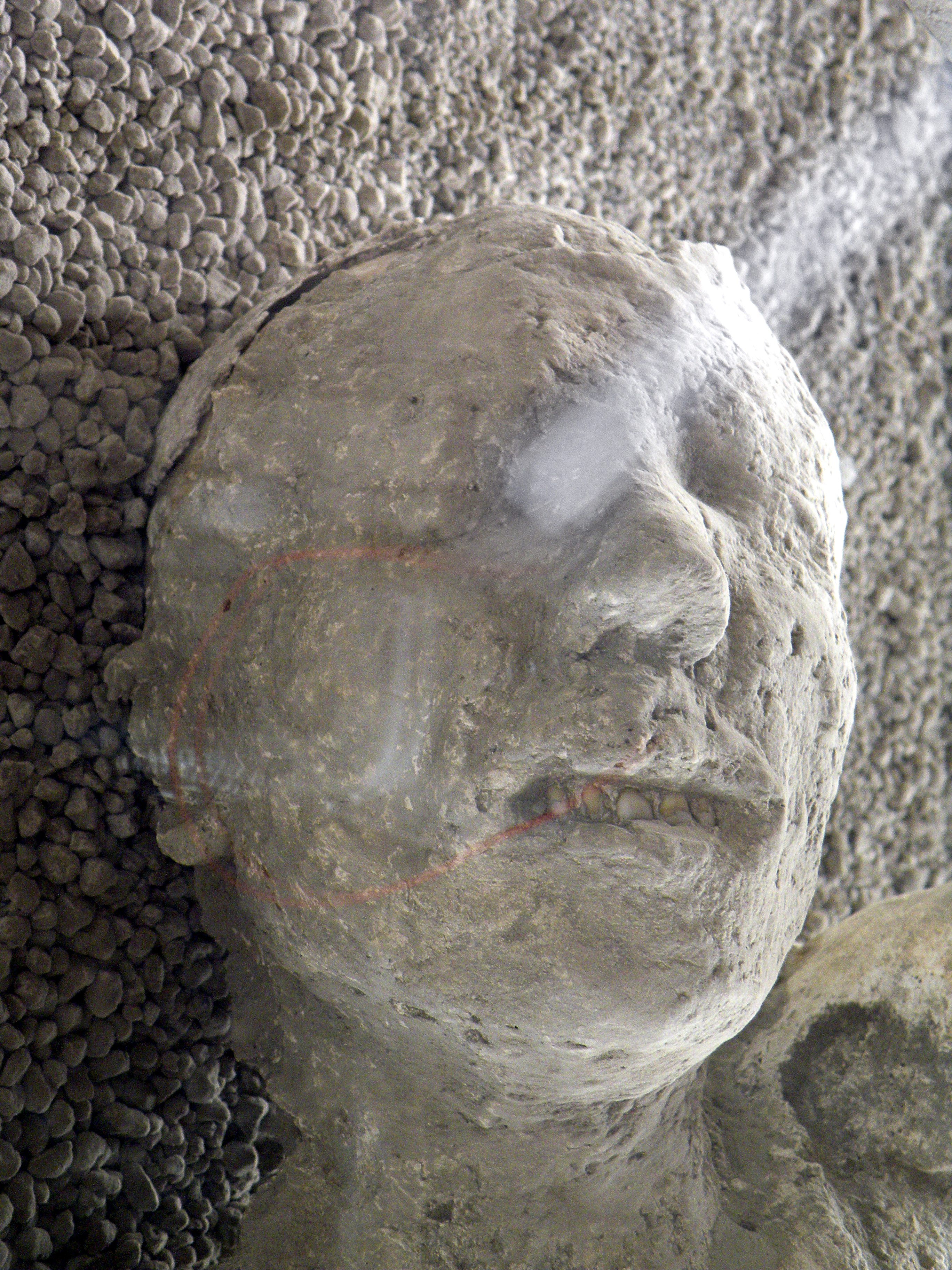 Жертва извержения Везувия. 79 год. Помпеи